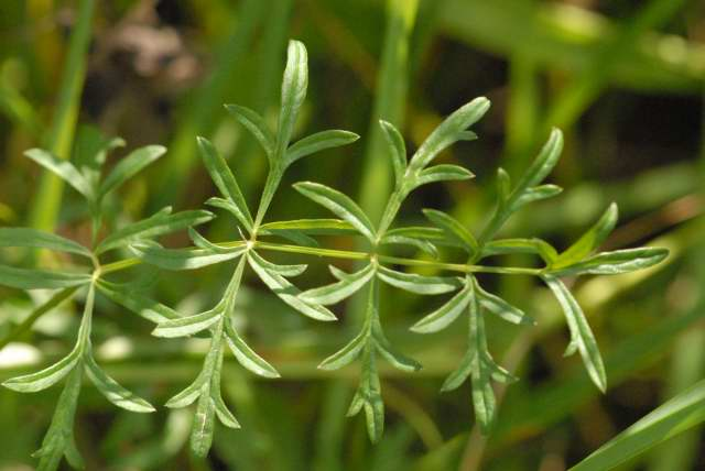 Pimpinella saxifraga from Commanster, Belgian High Ardennes .